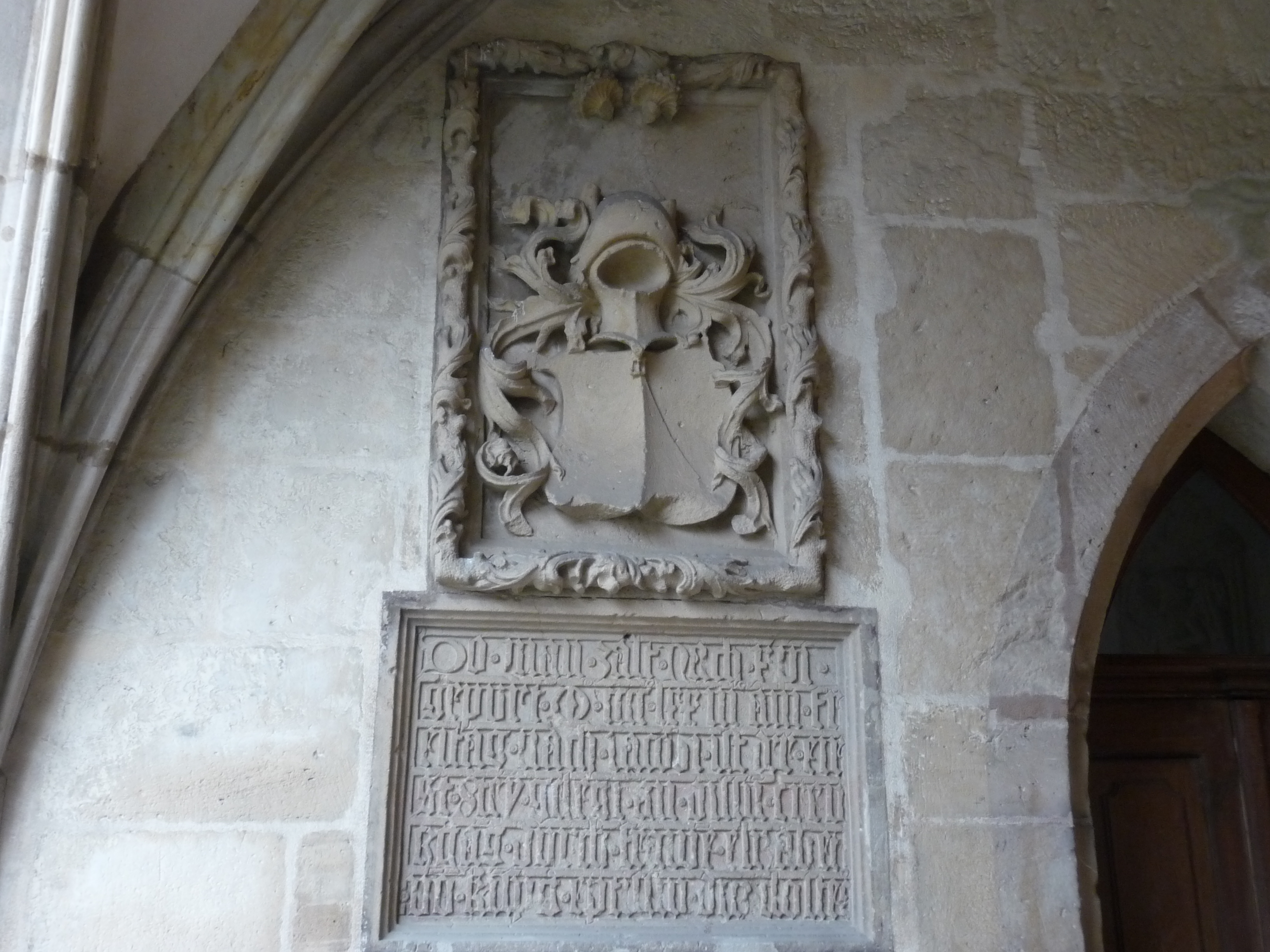 Hinweis auf Elisabeth von Künsberg als Erbauerin des Kreuzgangs im Kloster Himmelkron am Eingang desselben